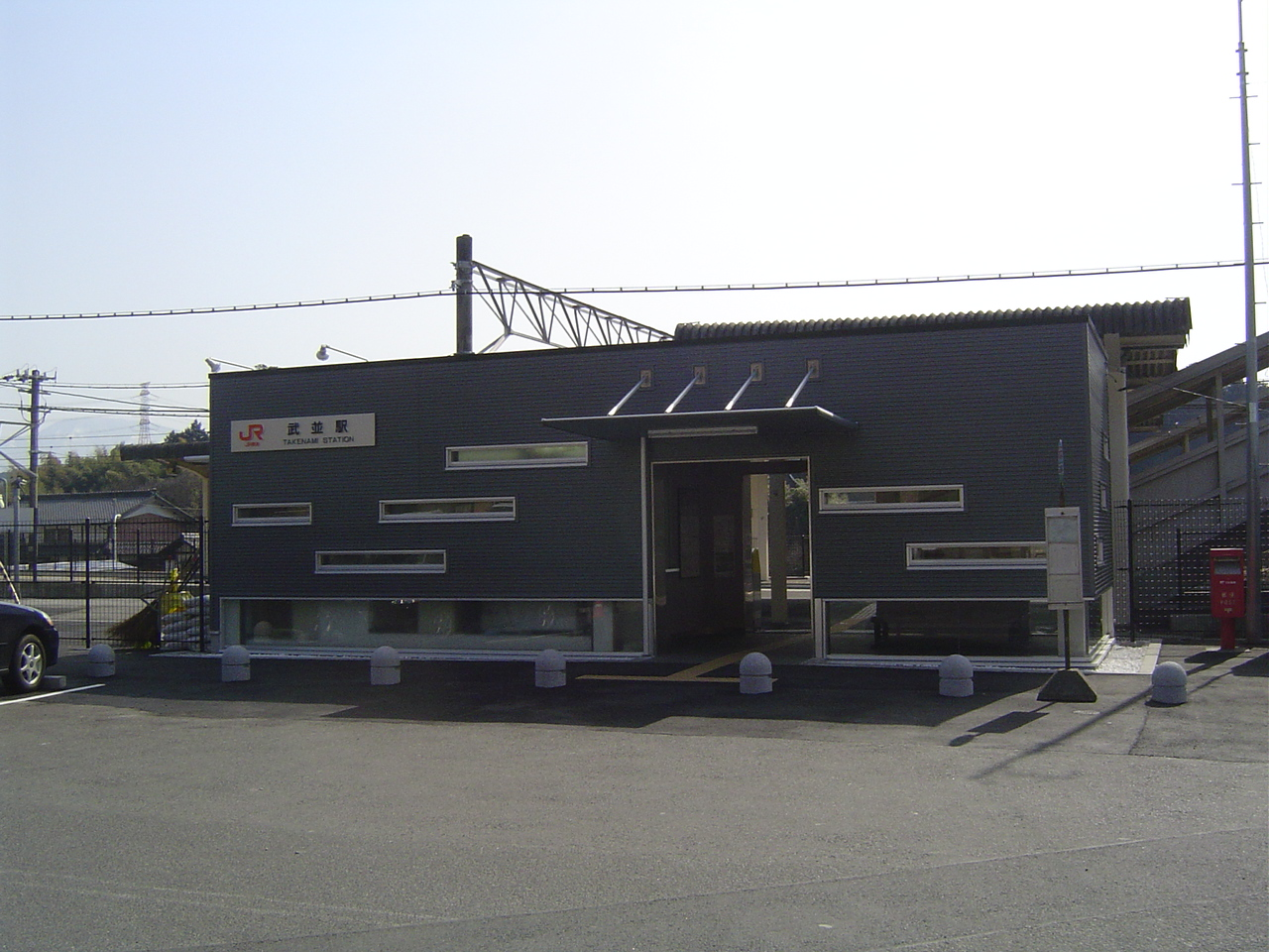 JR東海中央線武並駅（2008年改築）